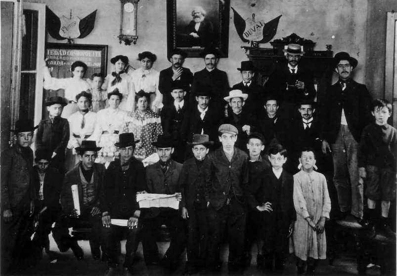 Comisión de Huelga de Cigarreros y Cigarras 1994. Buenos Aires.